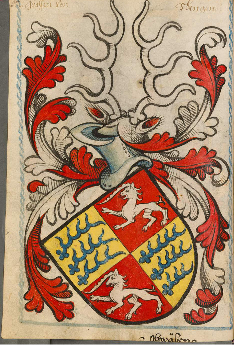 Scheibler'sches Wappenbuch, älterer Teil Seite 52: Grafen von Tengen und Nellenburg